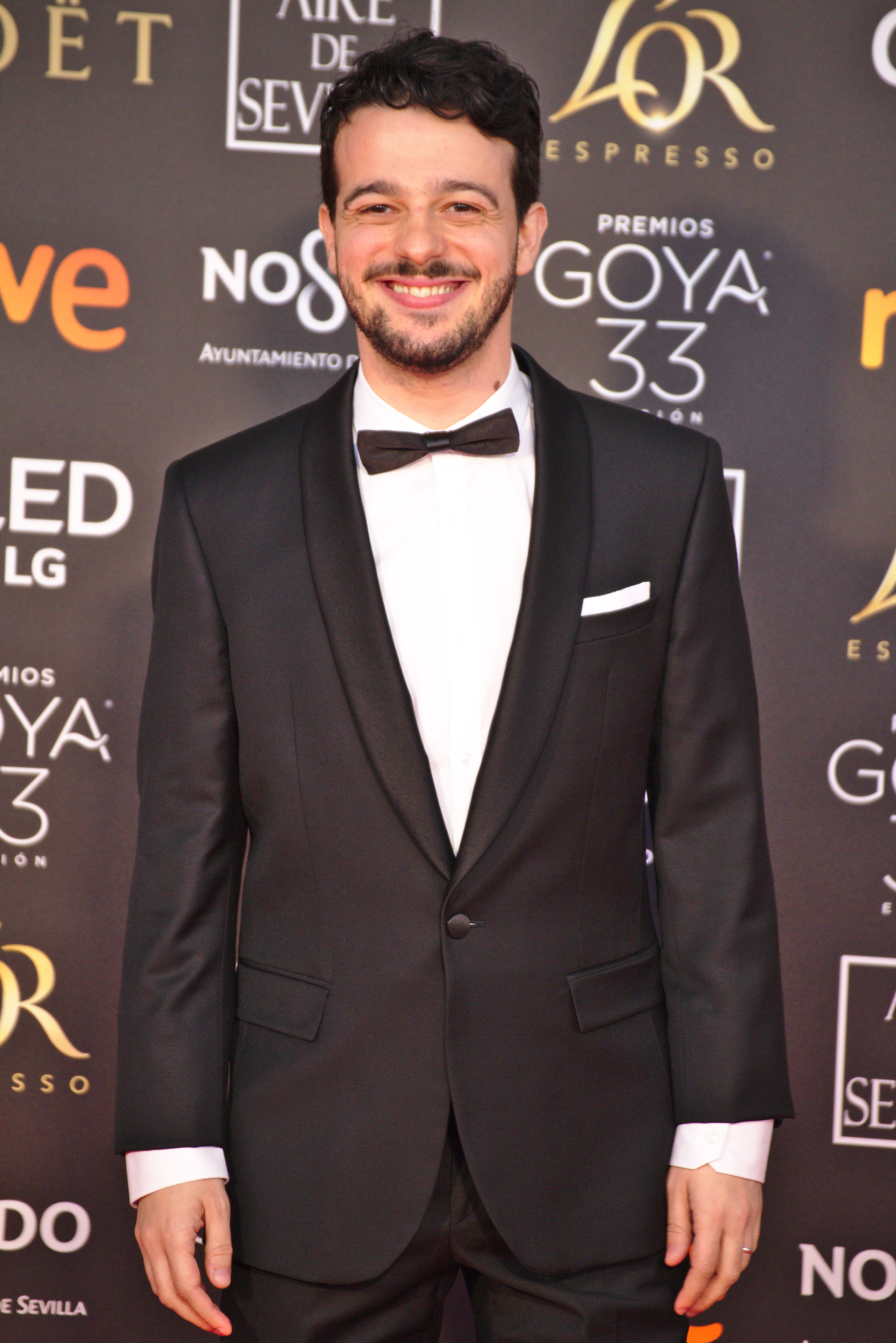 Fernando Tielve en la alfombra roja de los Premios Goya celebrados en Sevilla en Febrero 2019